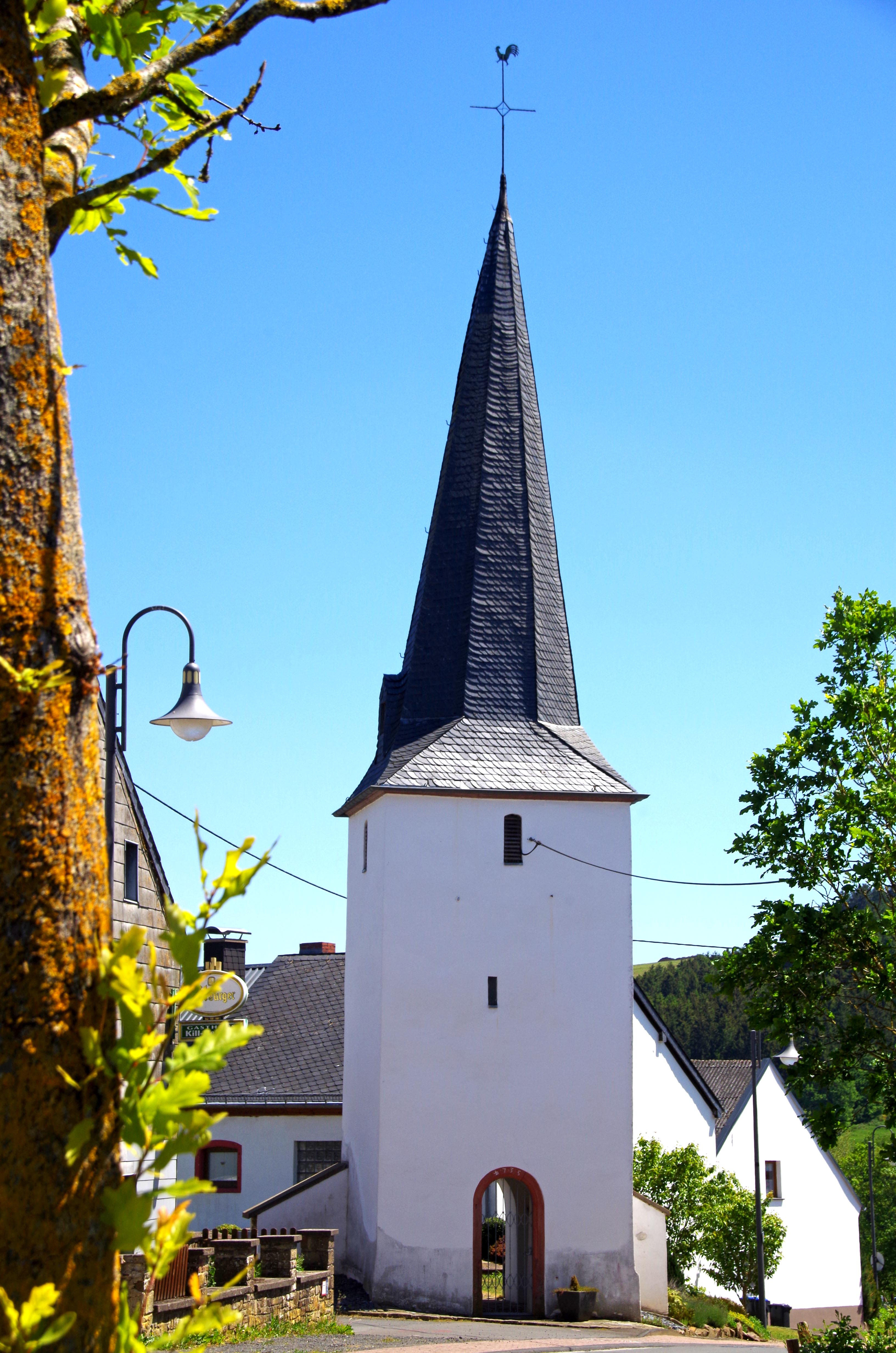 St. Leonhard (Weinsfeld), alter Westturm von 1735